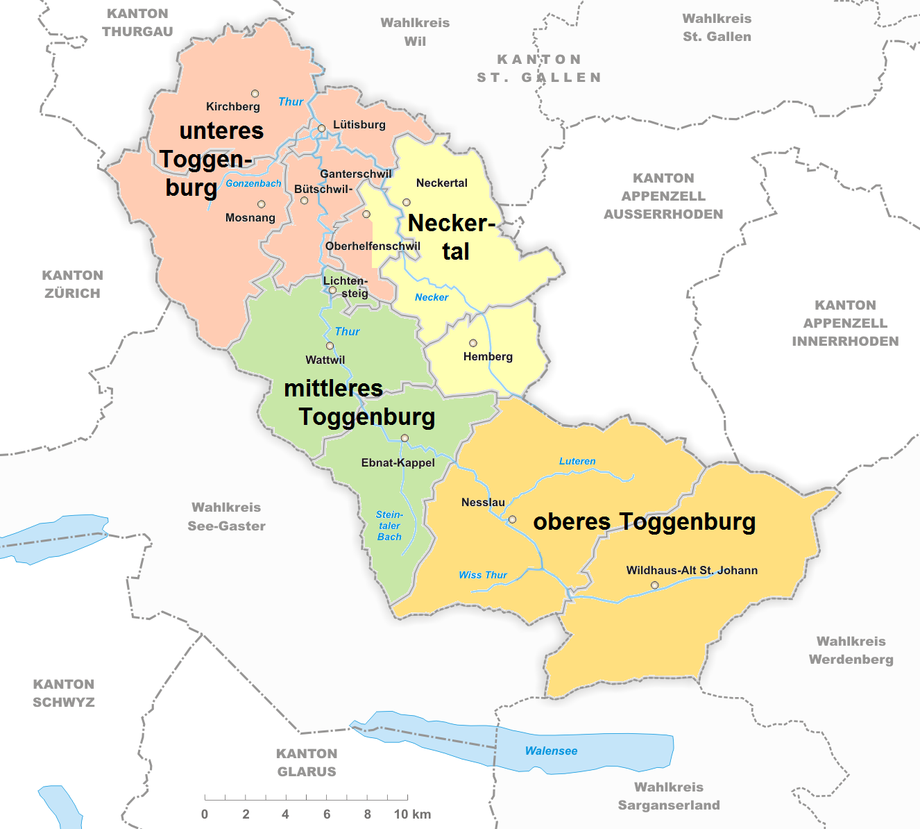 Gliederung des Toggenburg in oberes (orange), mittleres (grün) und unteres Toggenburg (rot) und Neckertal (gelb)